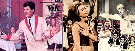 Club del Clan. De izquierda a derecha: Palito Ortega, Jolly Land, Johnny Tedesco (arriba) y Violeta Rivas (abajo)